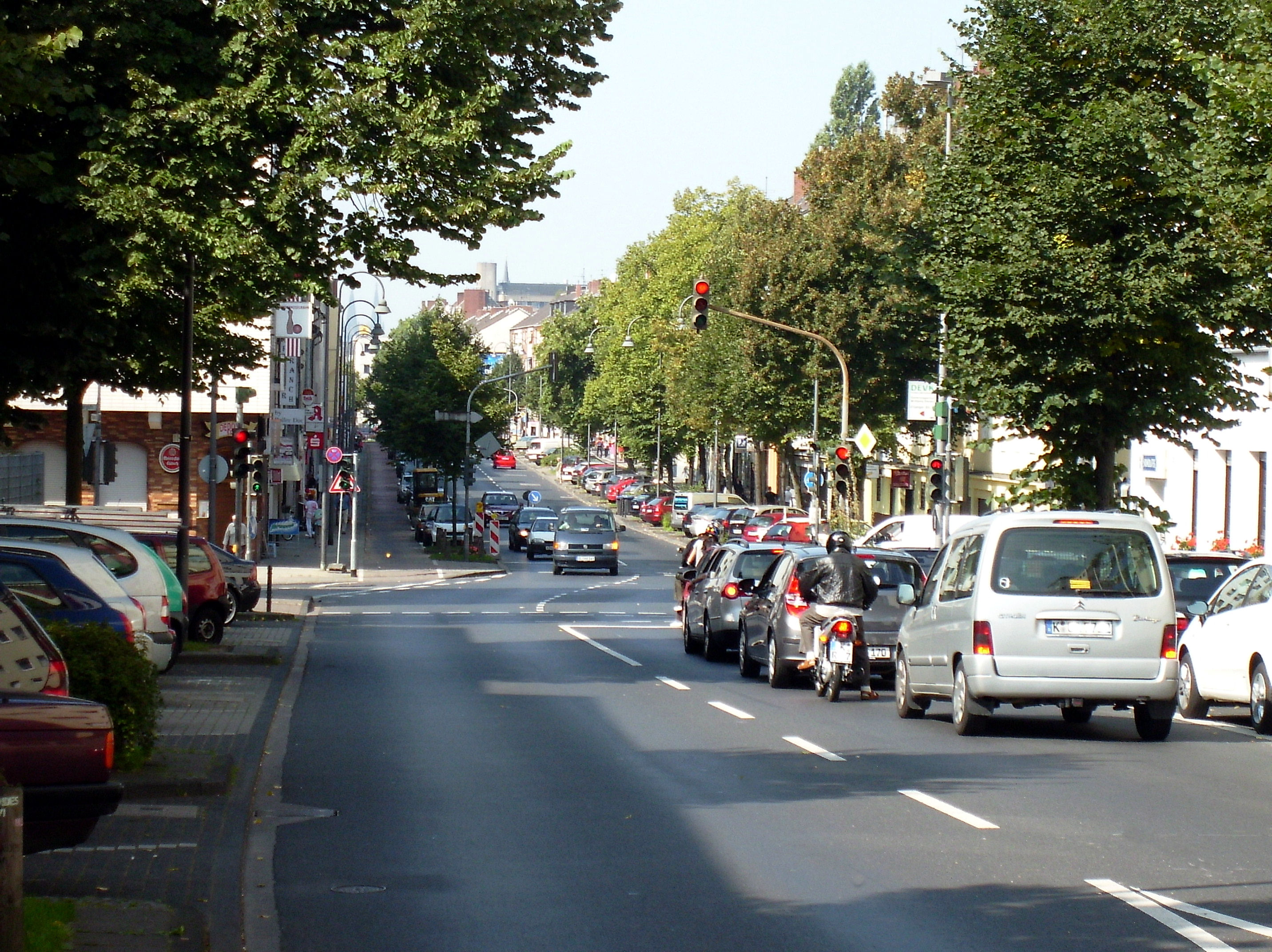 Olpener Str. in Köln-Höhenberg